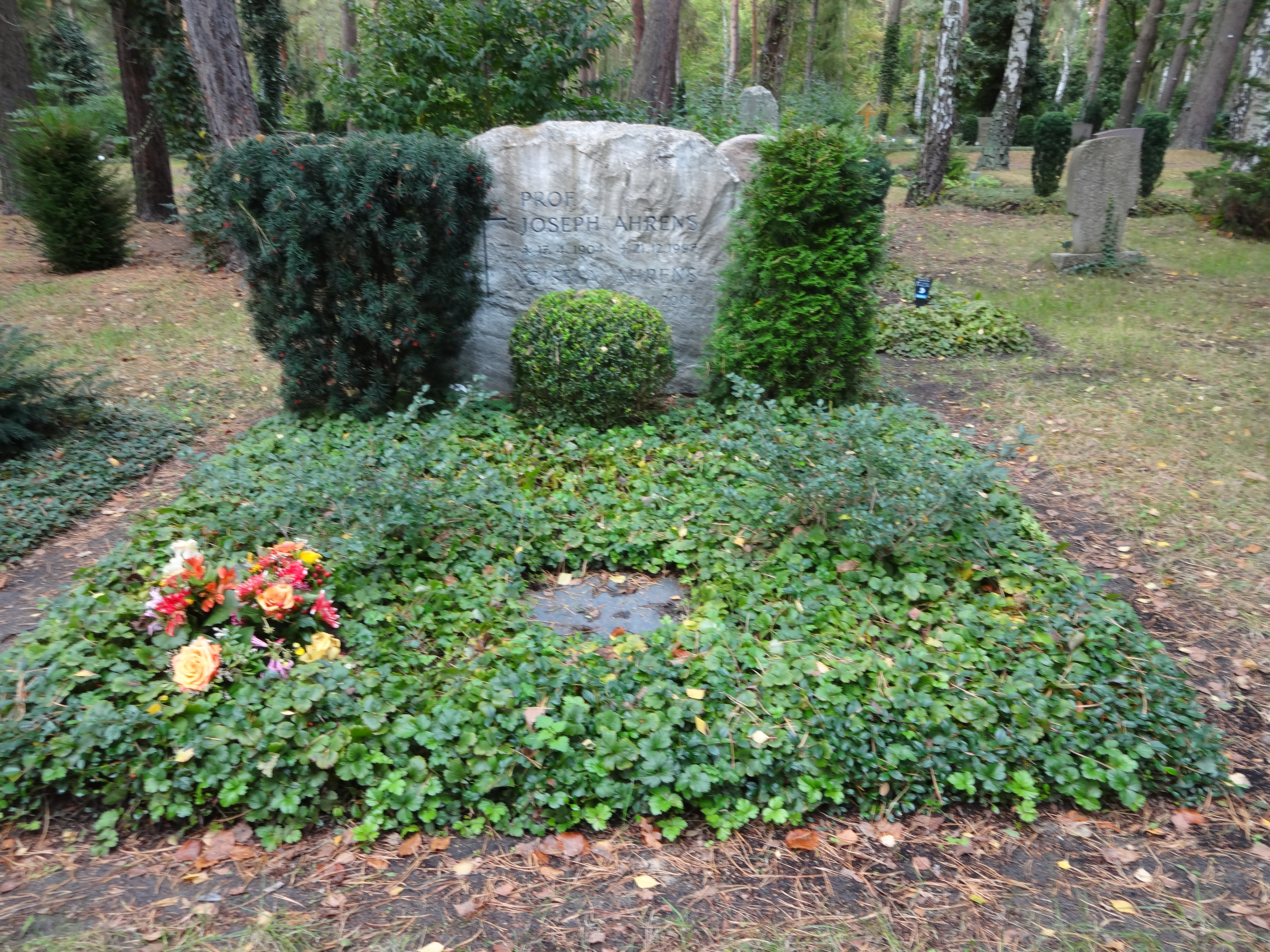 Grab von Prof. Joseph Ahrens auf dem Waldfriedhof Zehlendorf